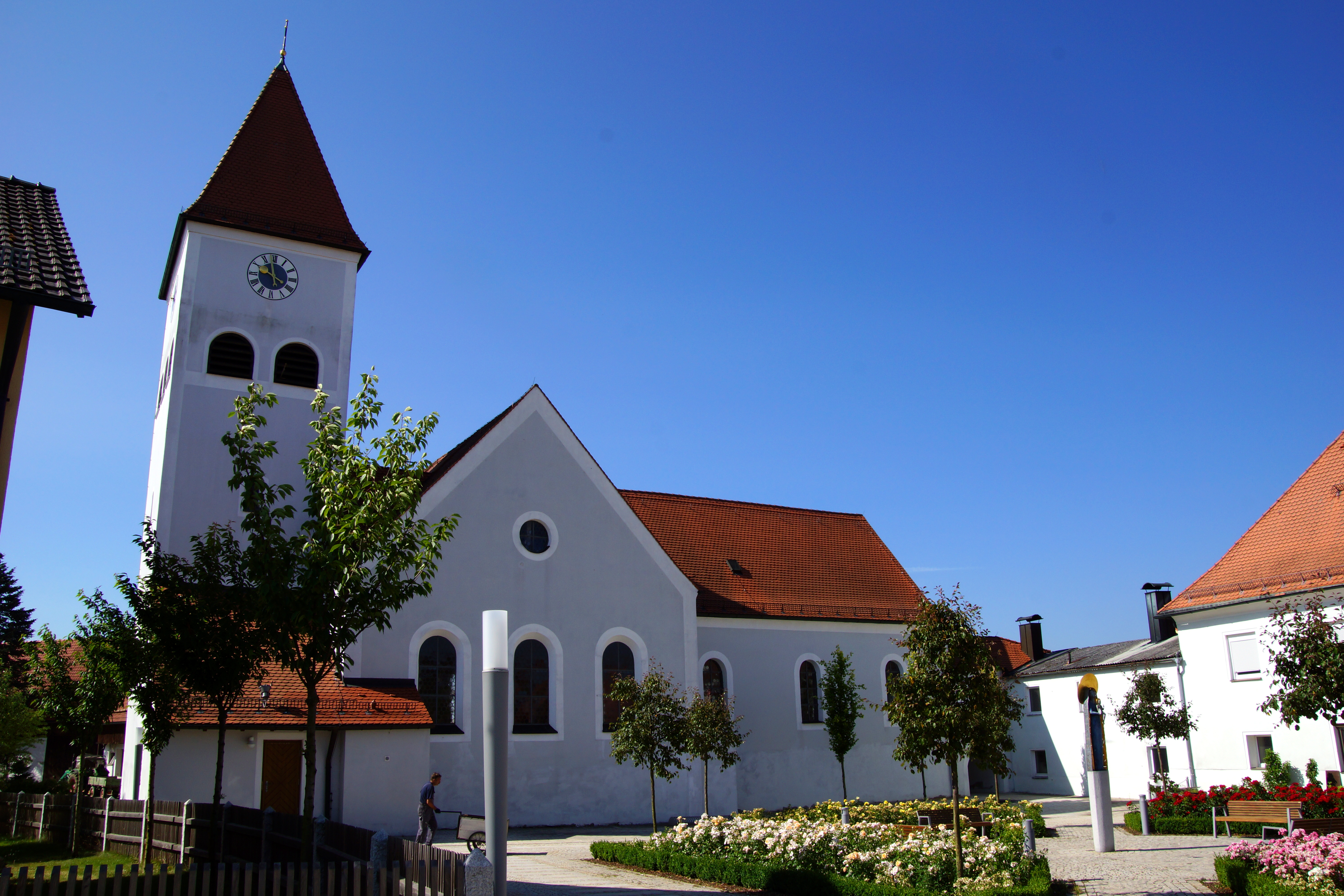 Die katholische Pfarrkirche St. Vitus in Ursensollen, Oberpfalz